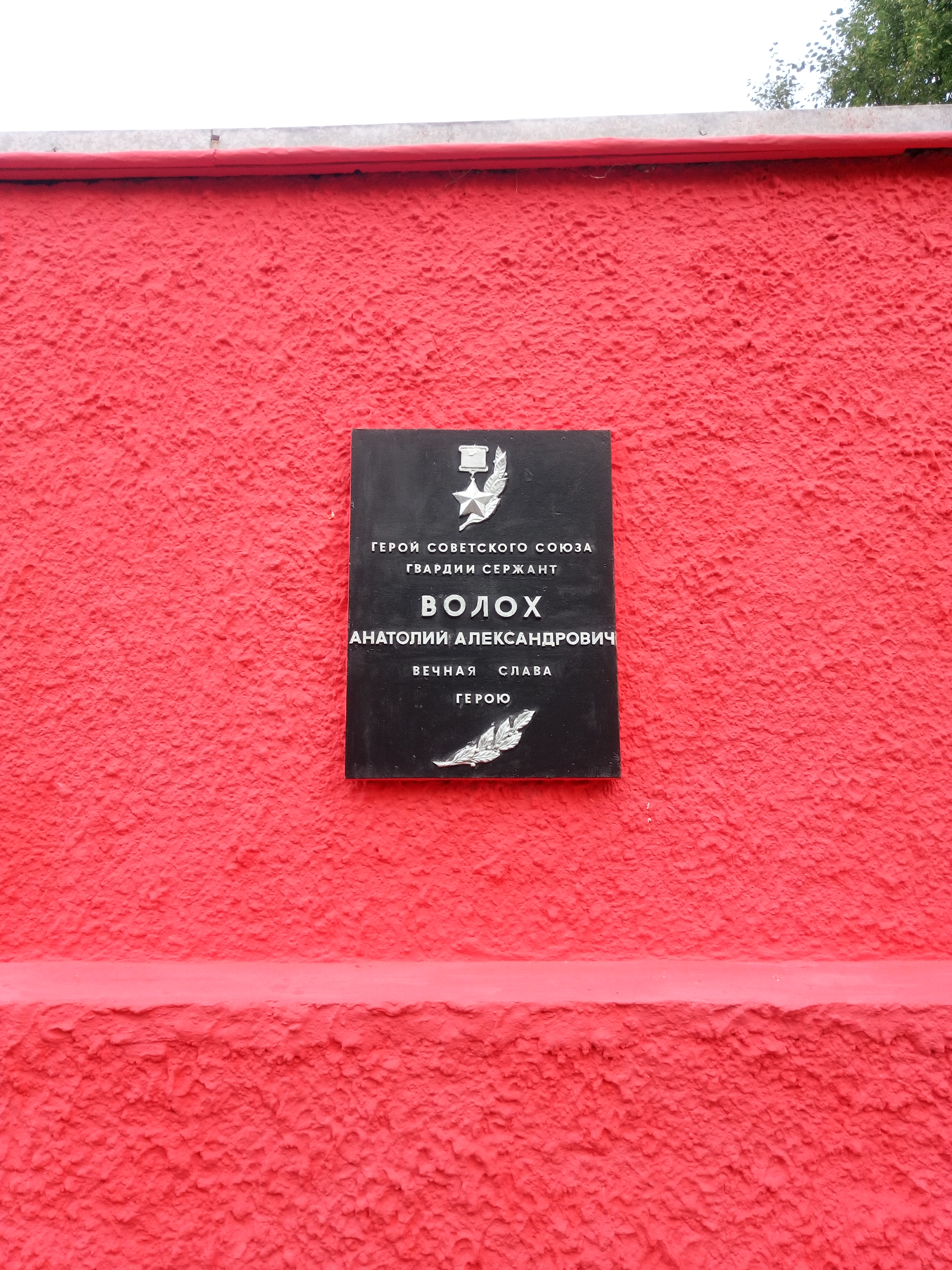 Мар’іна Горка. Мемарыял 8-ай танкавай дывізіі